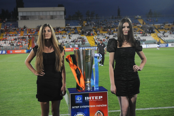 Суперкубок Украины по футболу 2012